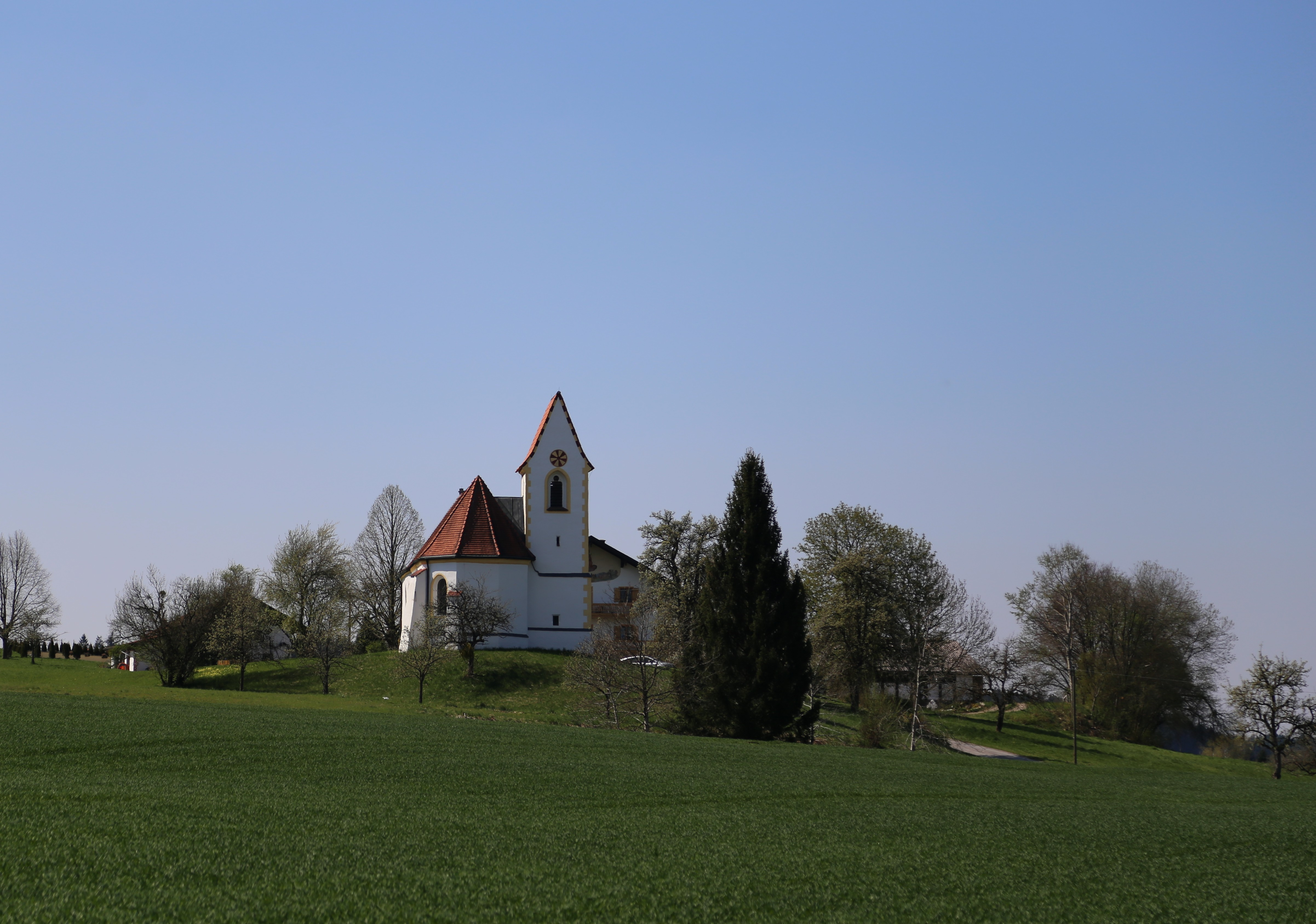 Katholische Filialkirche Mariä Verkündigung, Saalbau mit Steildach und nördlichem Satteldachturm, im Kern romanisch, spätgotischer Chor und Wölbung 15. Jahrhundert, um 1725 barocker Ausbau; mit Ausstattung. Elendskirchen, Feldkirchen-Westerham.